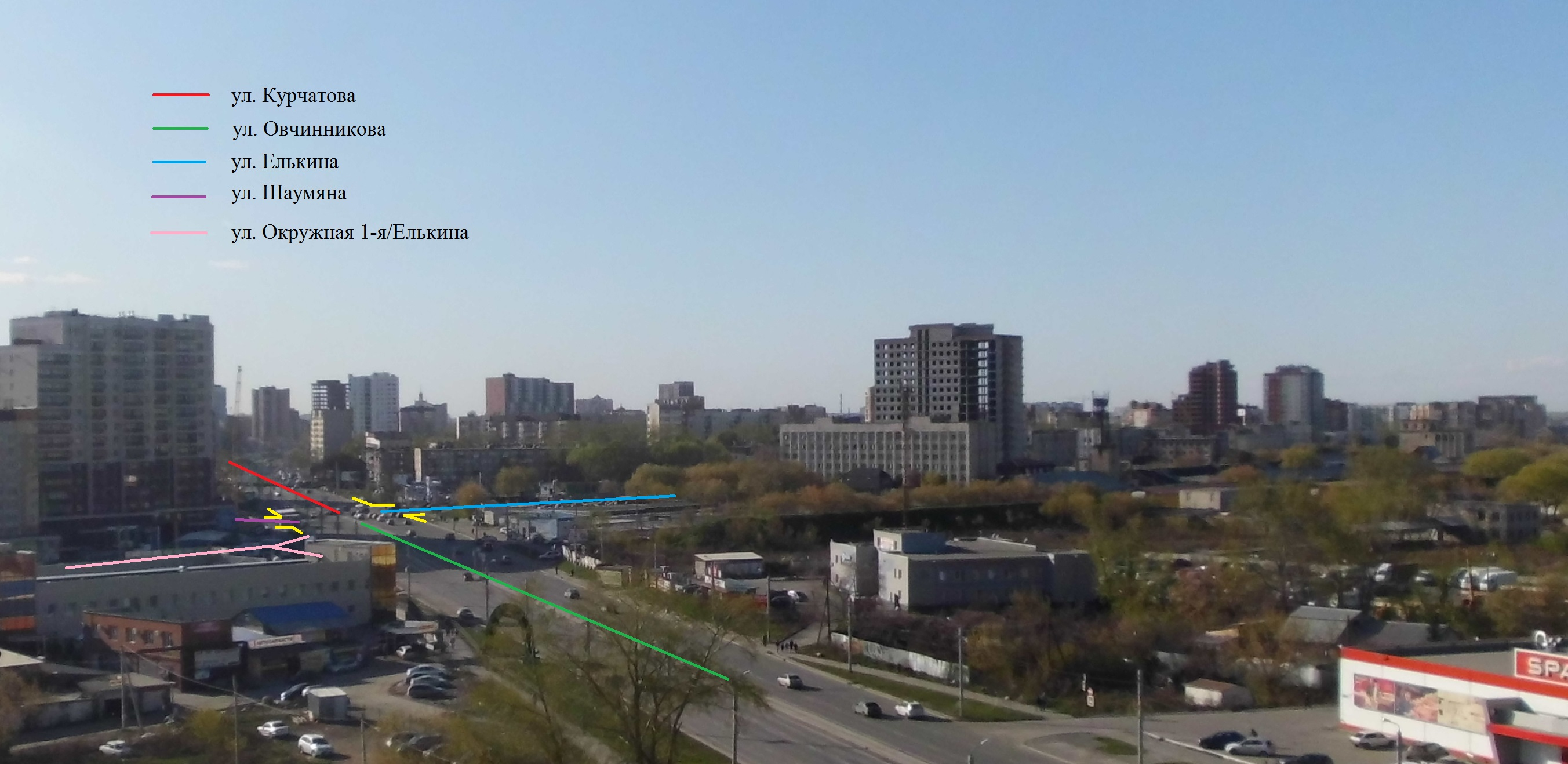 Россия, г. Челябинск